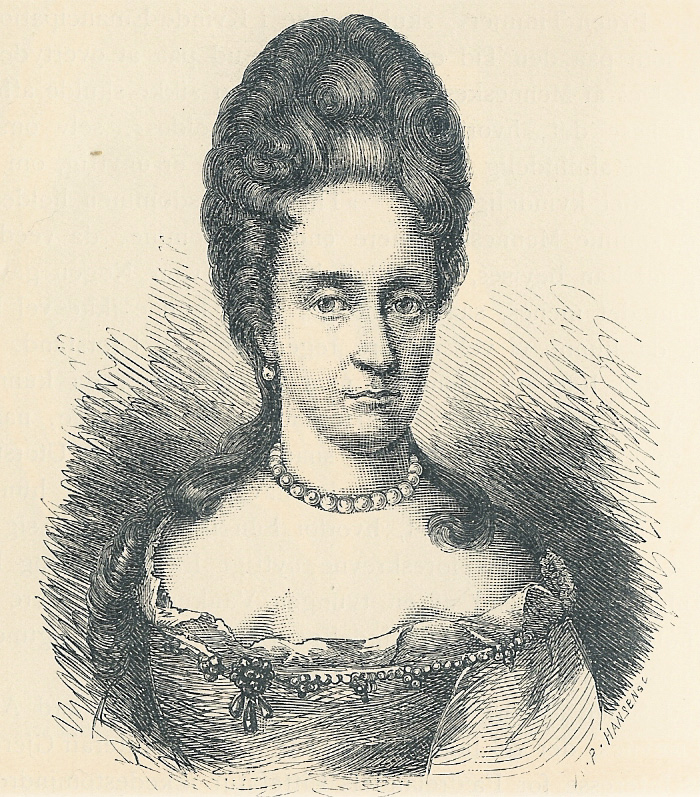 Karen Brahe, stik efter maleri fra 1699.